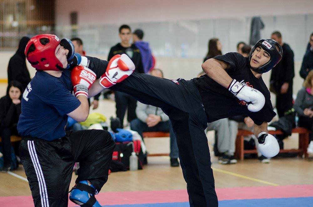 Дюк Нуамеруе е световен и европейски шампион по кик бокс